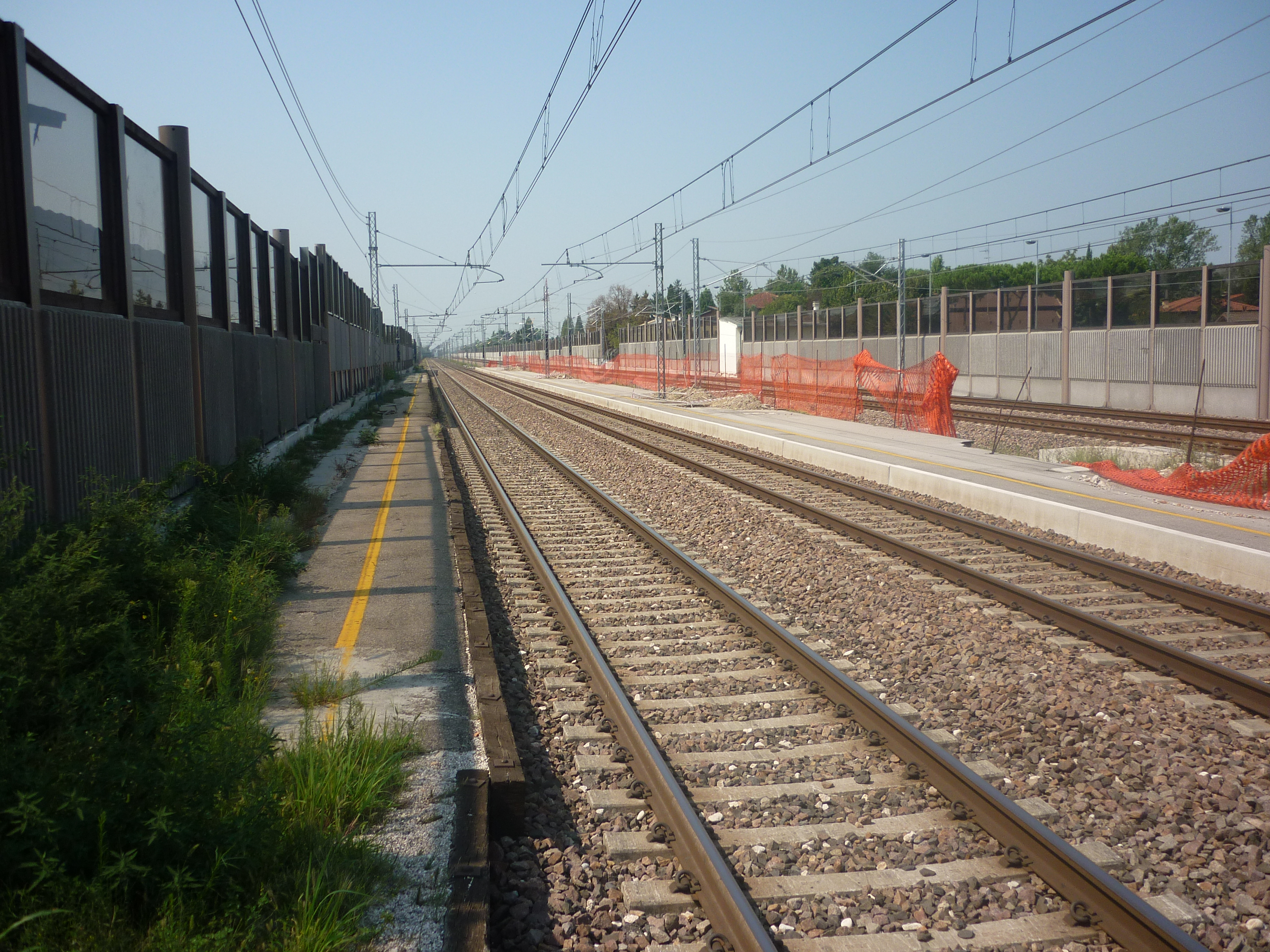 fs